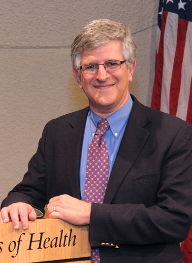 American pediatrician Paul Offit.